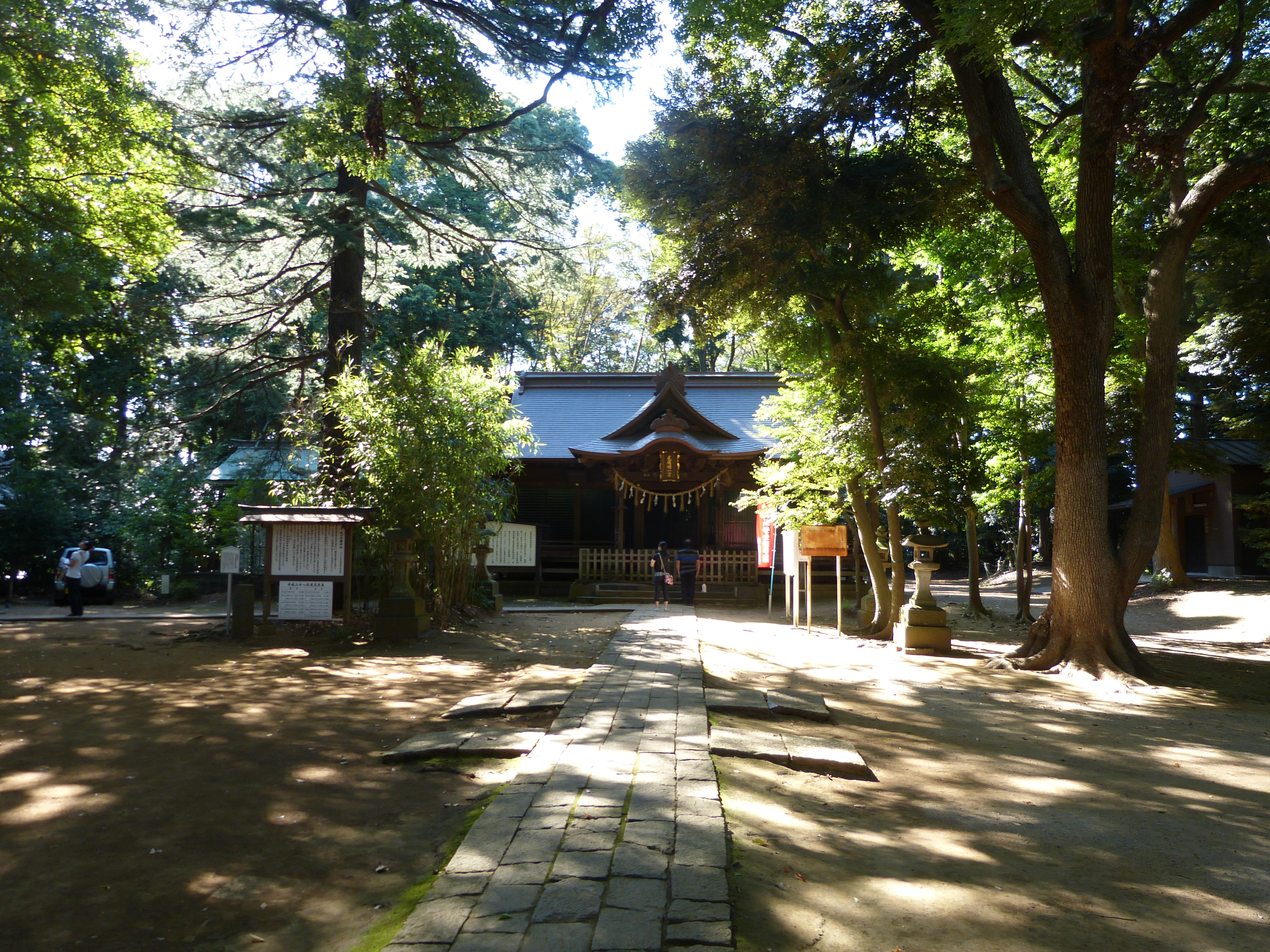 氷川女体神社、拝殿